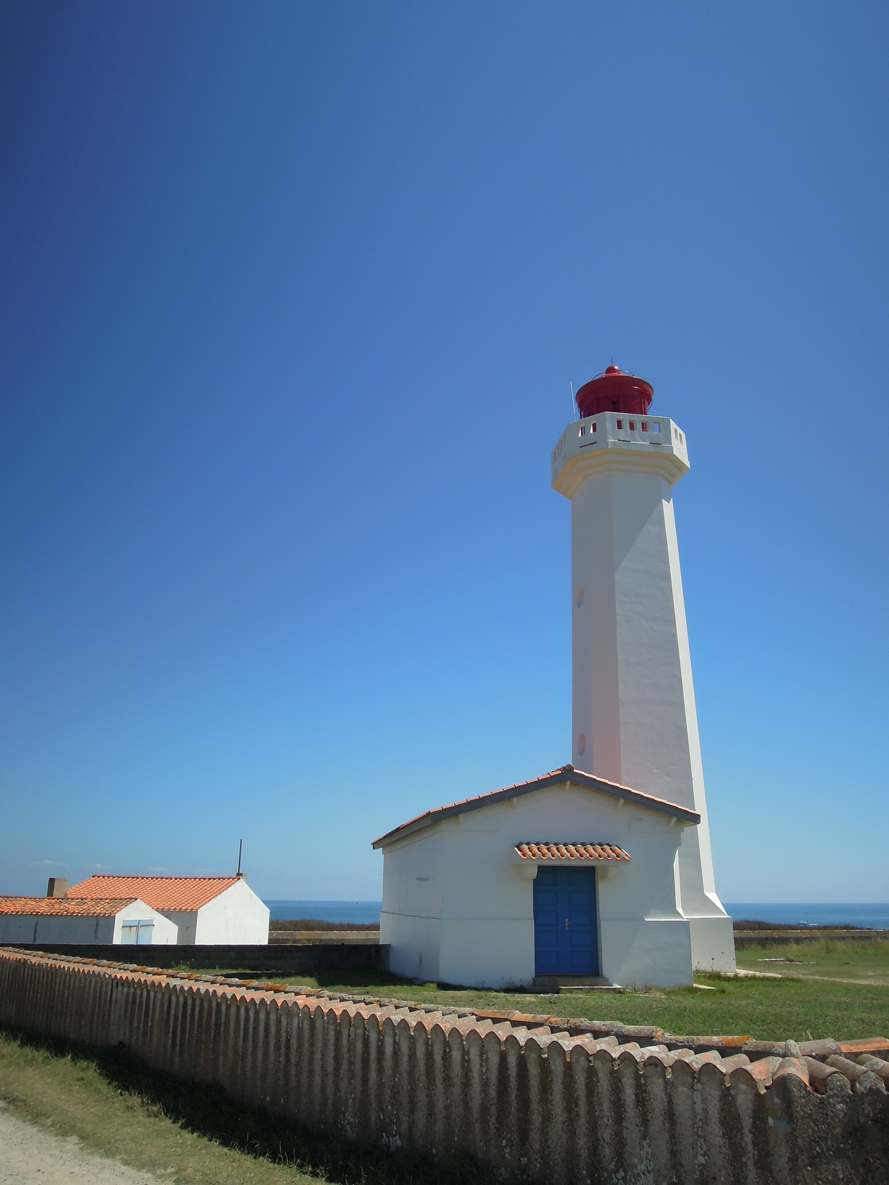 Phare des Corbeaux de l'ile d'Yeu